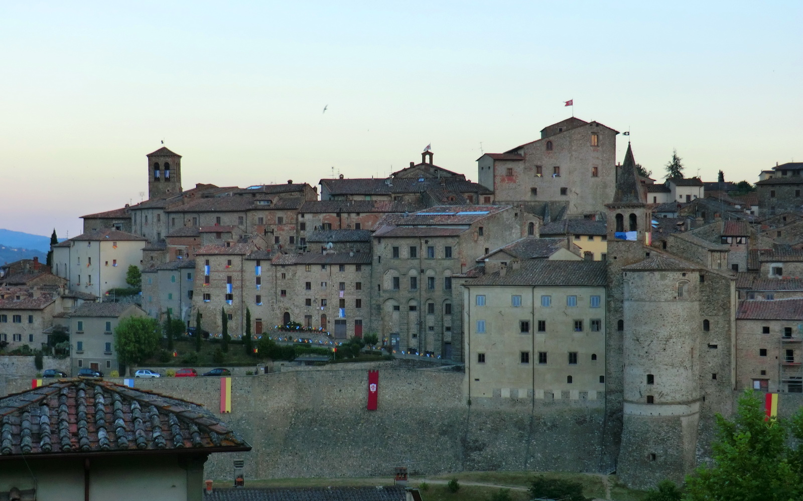 Anghiari, Italy